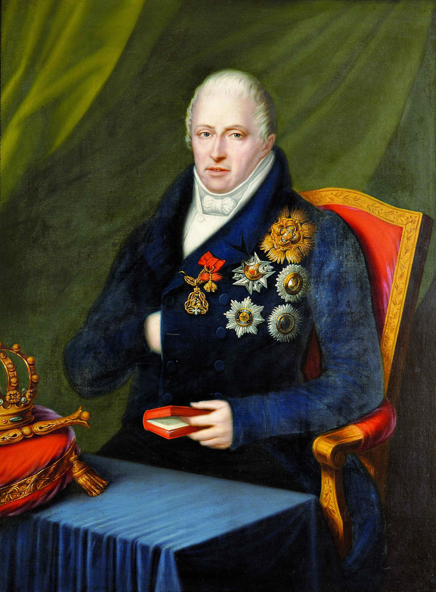 Ritratto di Carlo Felice di Savoia (1765-1831))